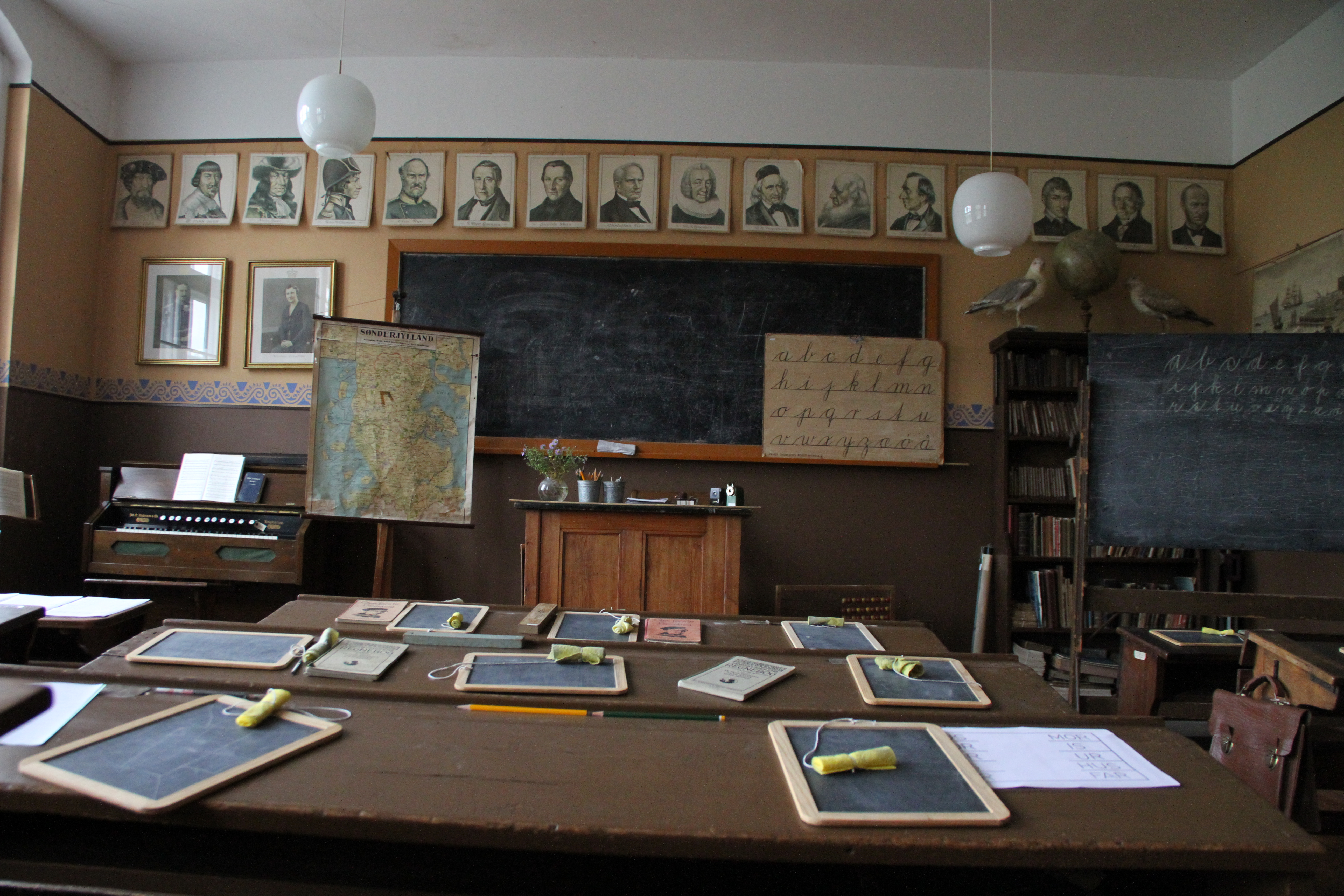 Rekonstruktion af klasseværelse fra 1907. Anskuelsestavler, kort over Sønderjylland, orgel, skolepulte, tavler og grifler, udstoppede dyr.